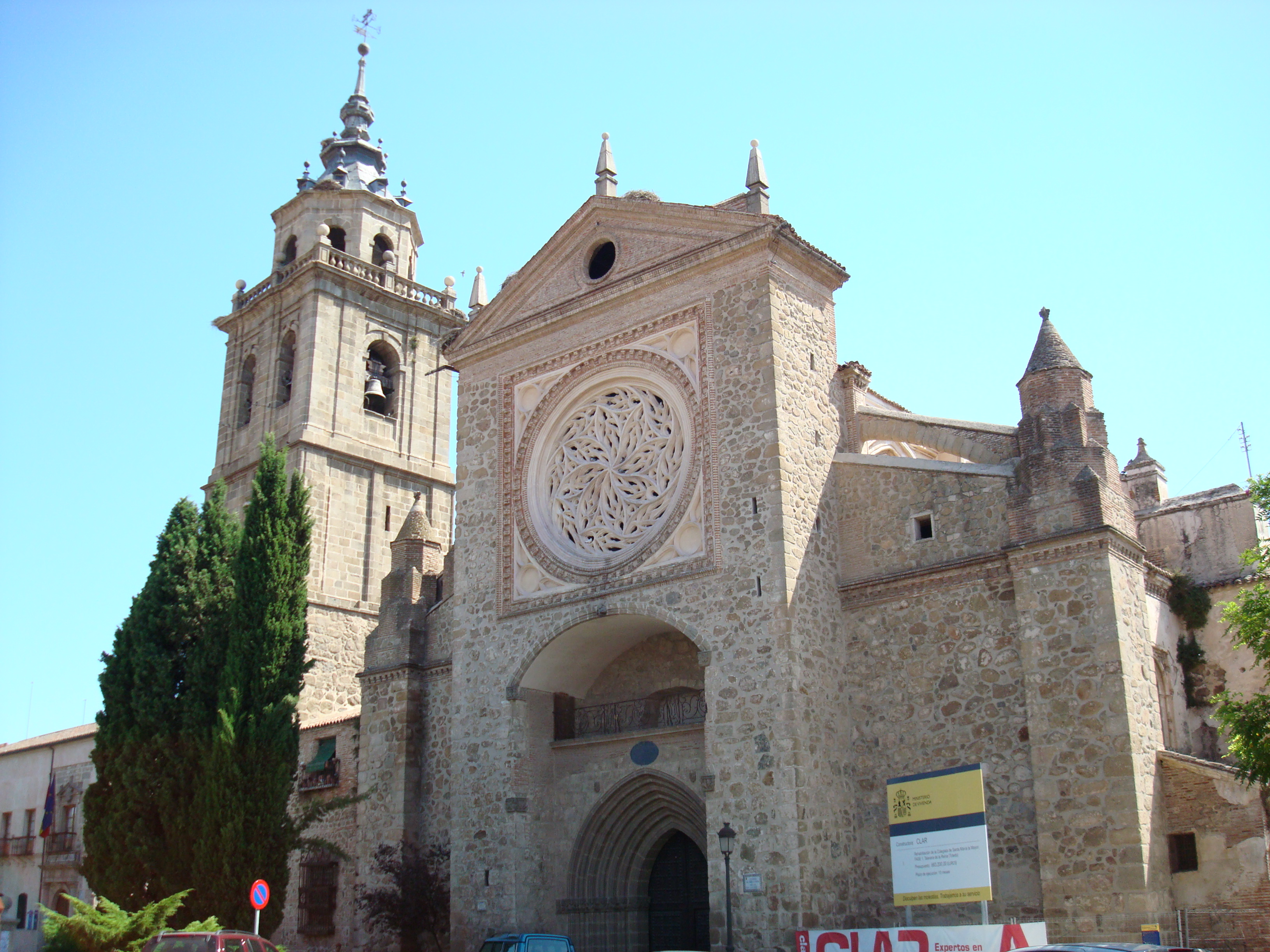 Colegial Church in Talavera de la Reina (Spain)